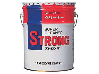 ストロング